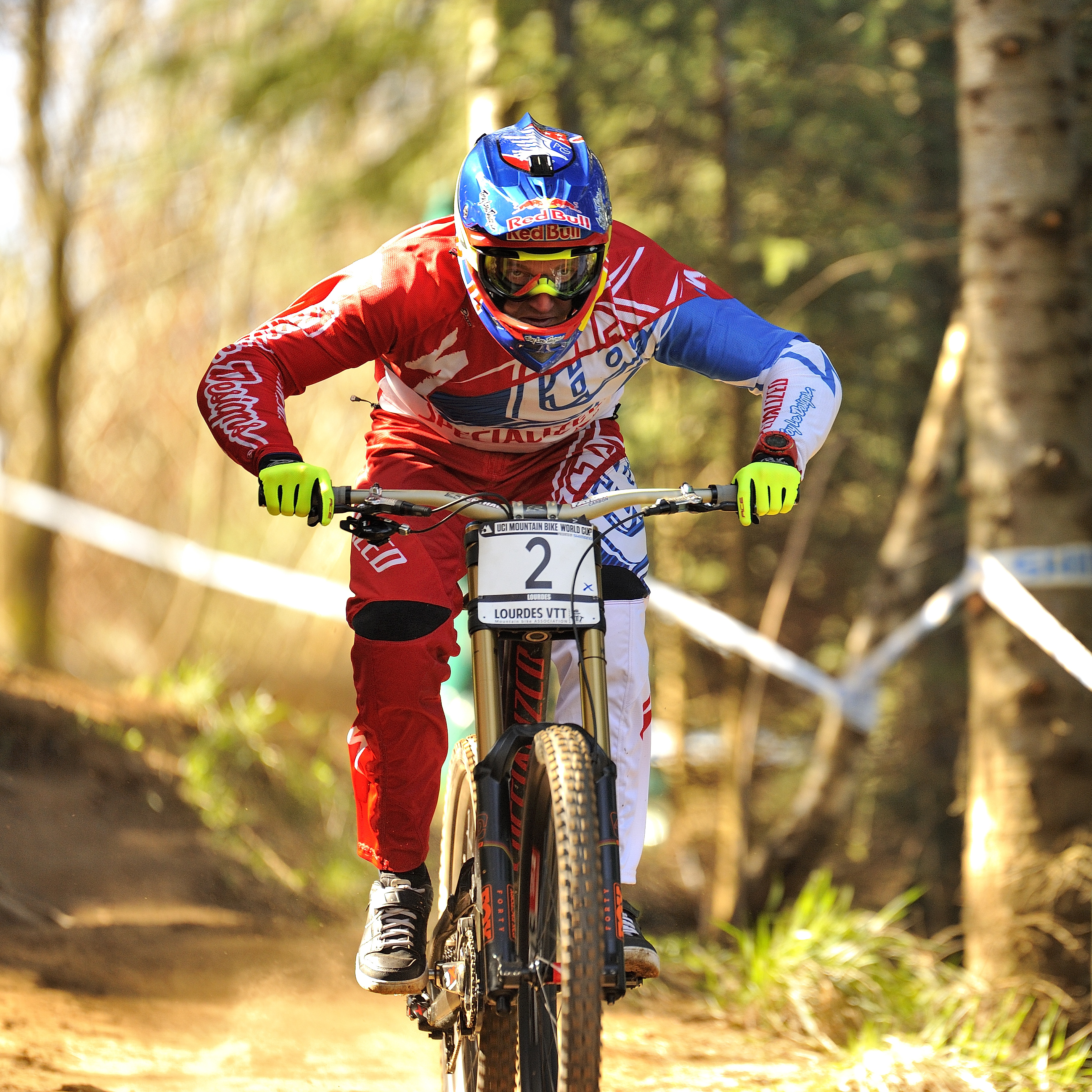 Aarong Gwin à Lourdes pour la 1ère manche de Coupe du Monde 2015